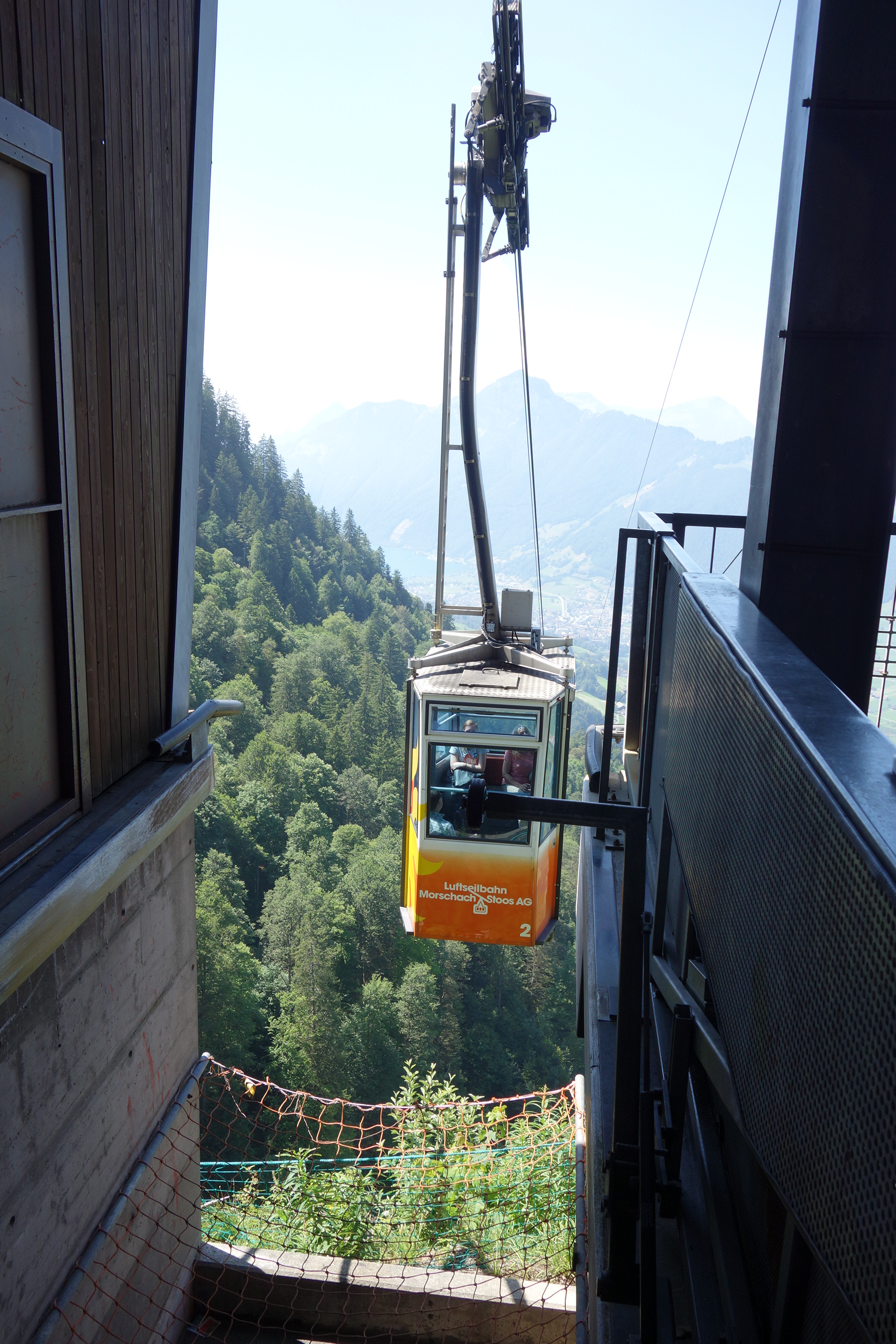 Luftseilbahn Morschach–Stoos SZ, Schweiz